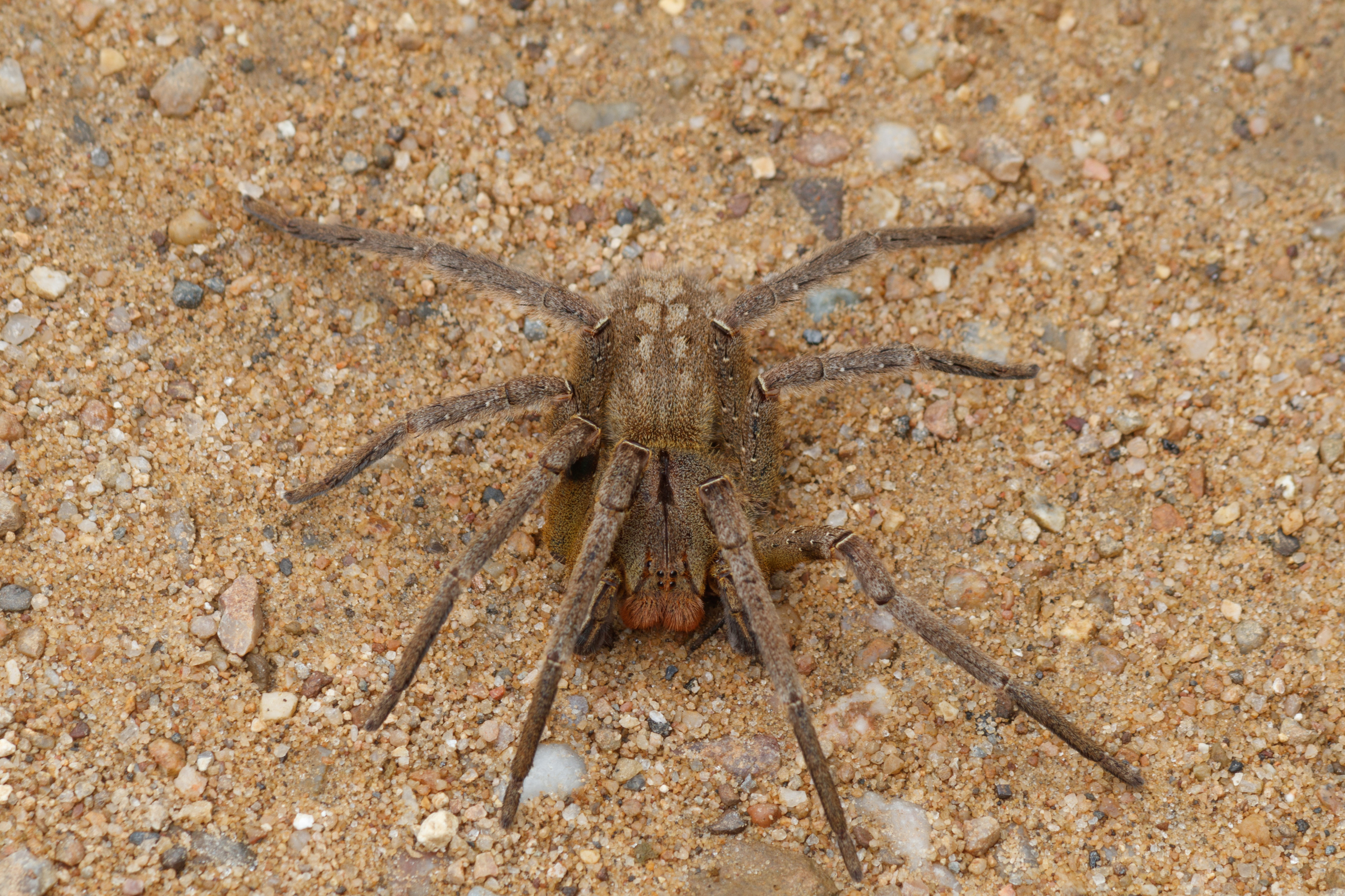 Núcleo Santana por Rodrigo Tetsuo Argenton feitas na expedição PETAR fevereiro 2020